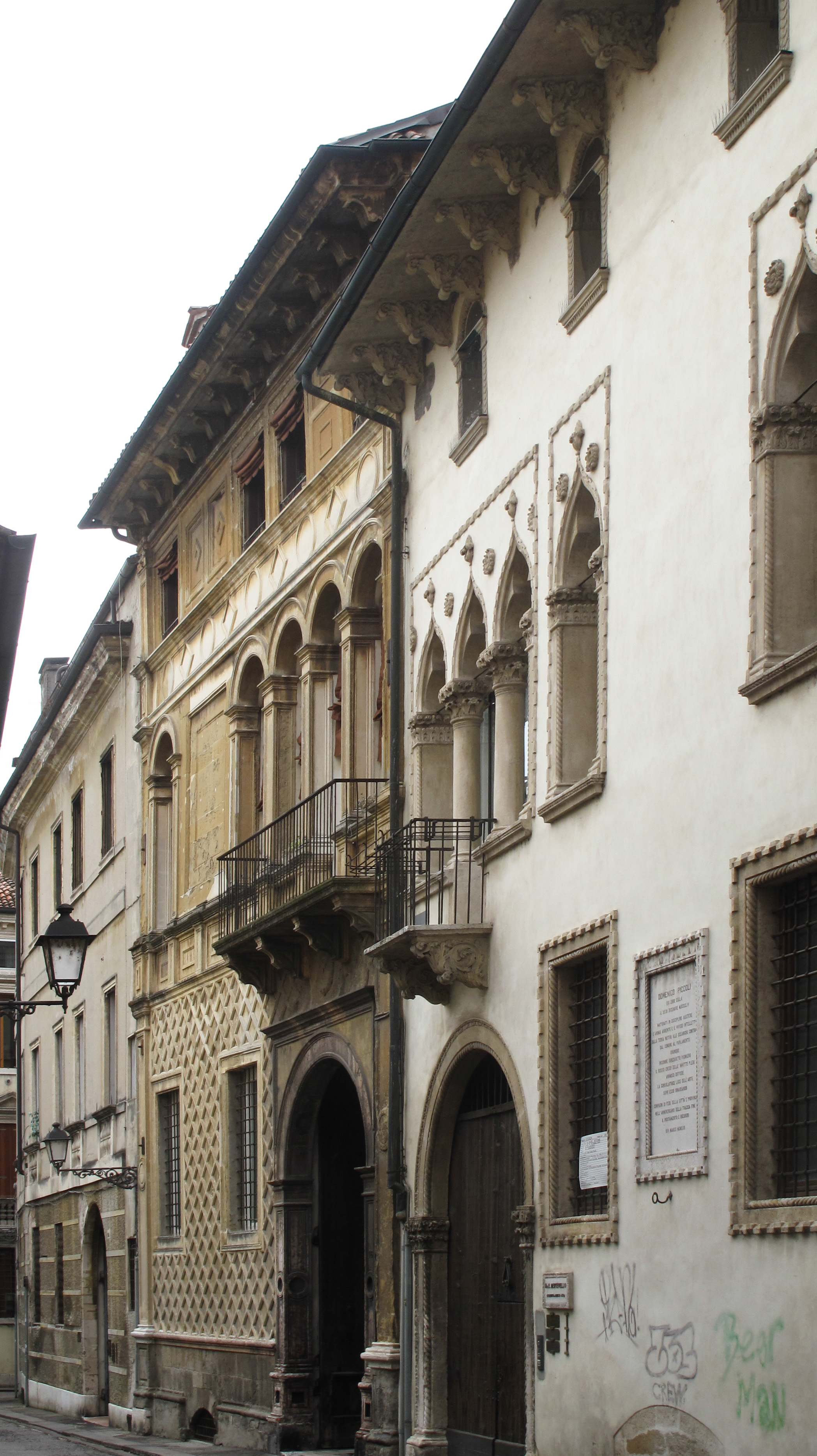 Vicenza - Palazzi Arnaldi